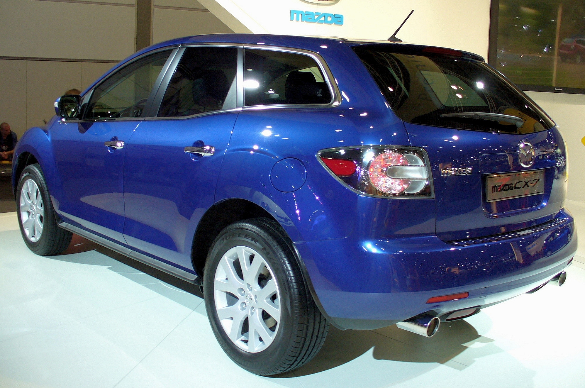 Mazda CX-7